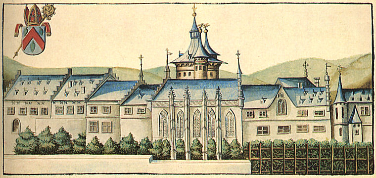 Dessin représentant l'abbaye de Saint-Laurent de Liège au XVIème siècle.